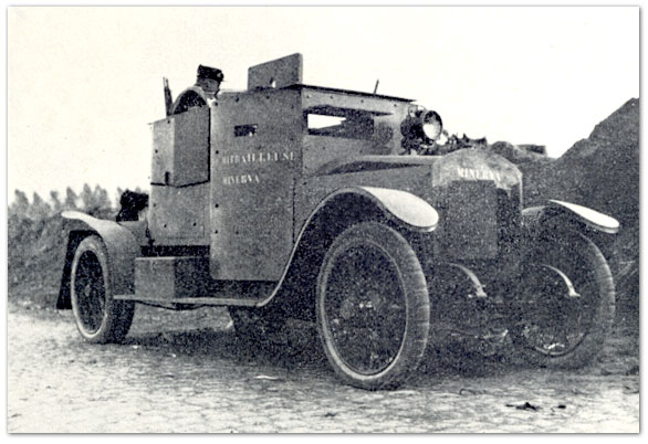 Minerva armored car, model 1914 WW1